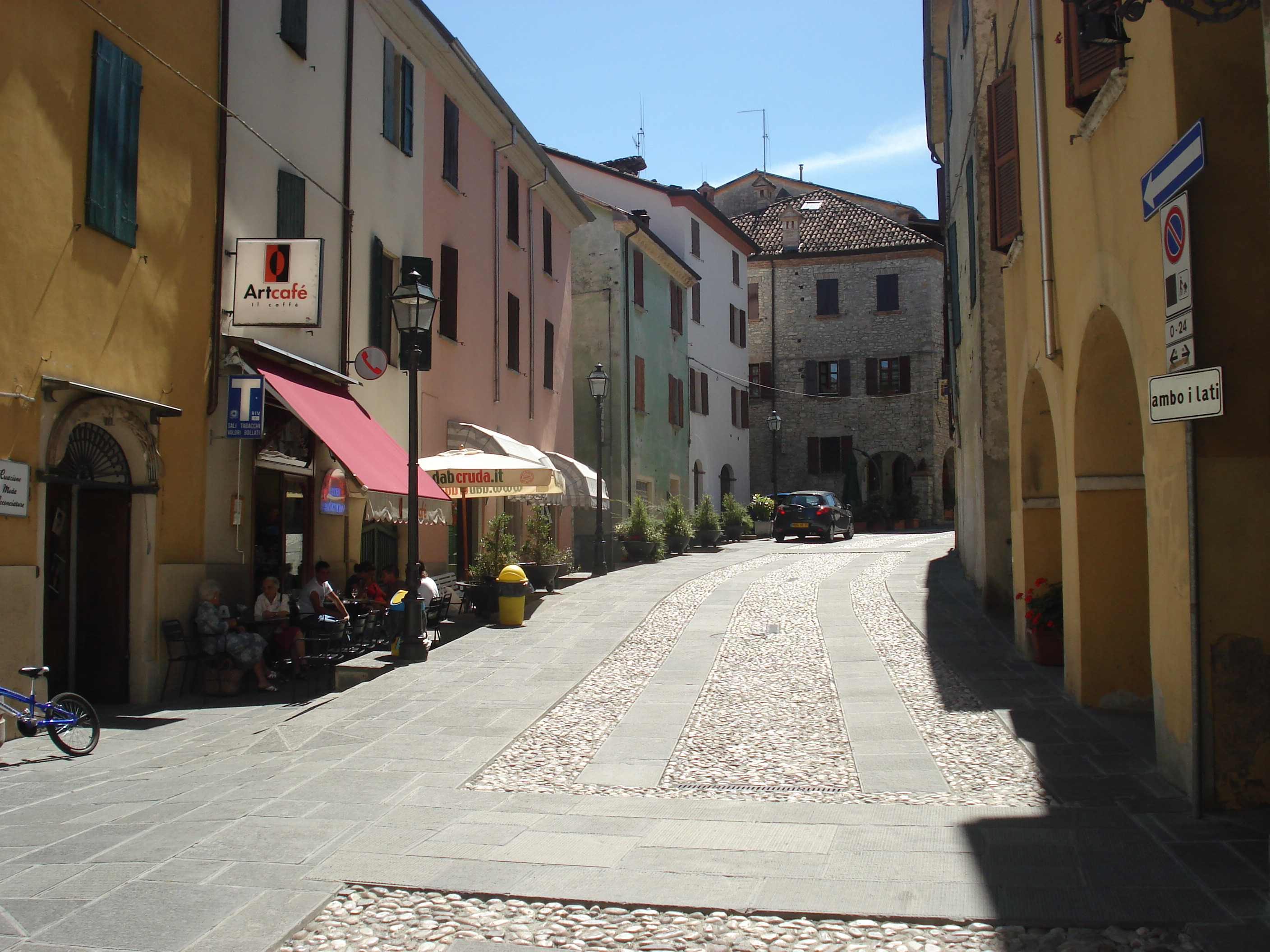 Strada storica principale di Calestano